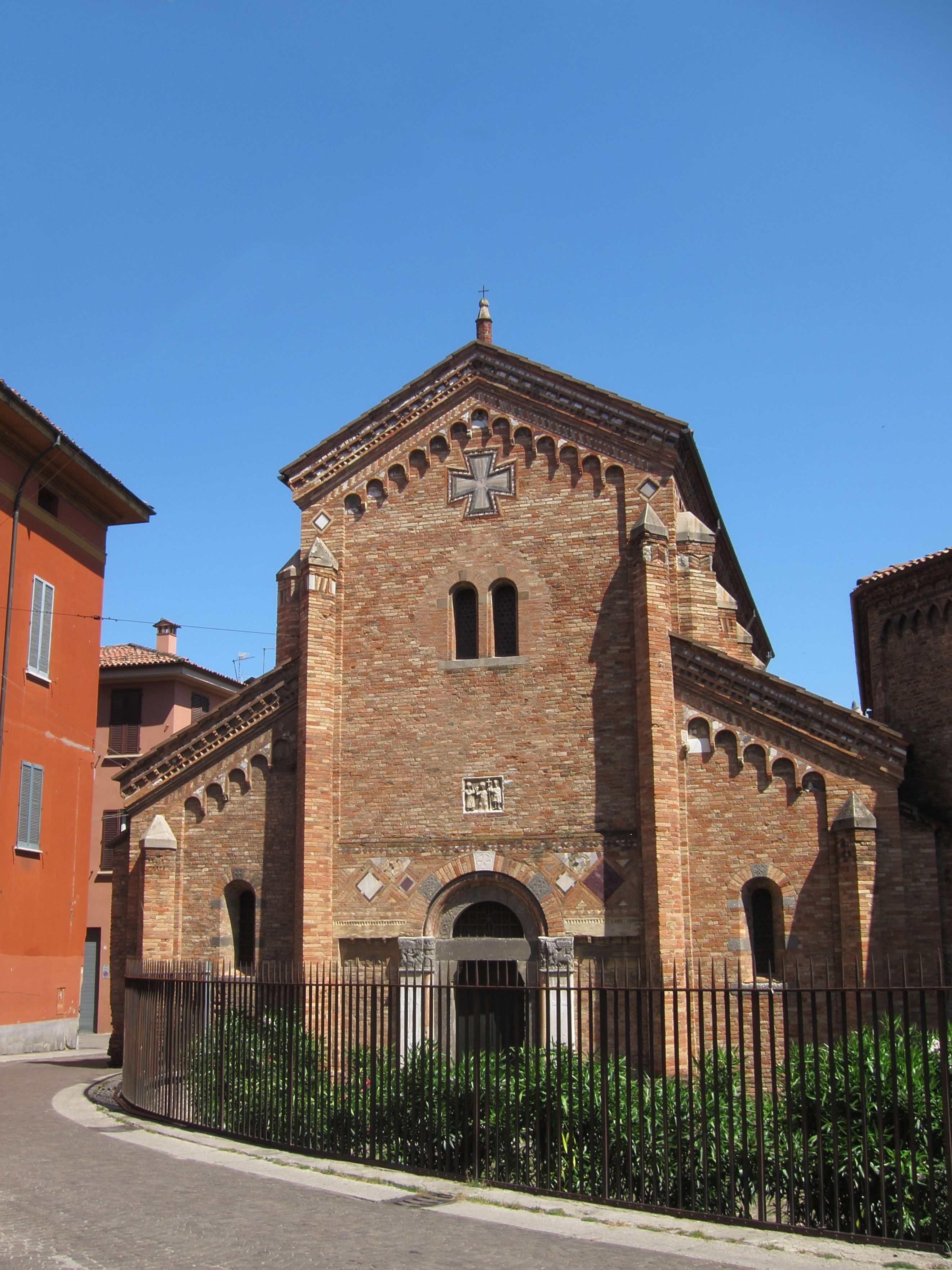 Santo Stefano (Bologna): Santi Vitale e Agricola